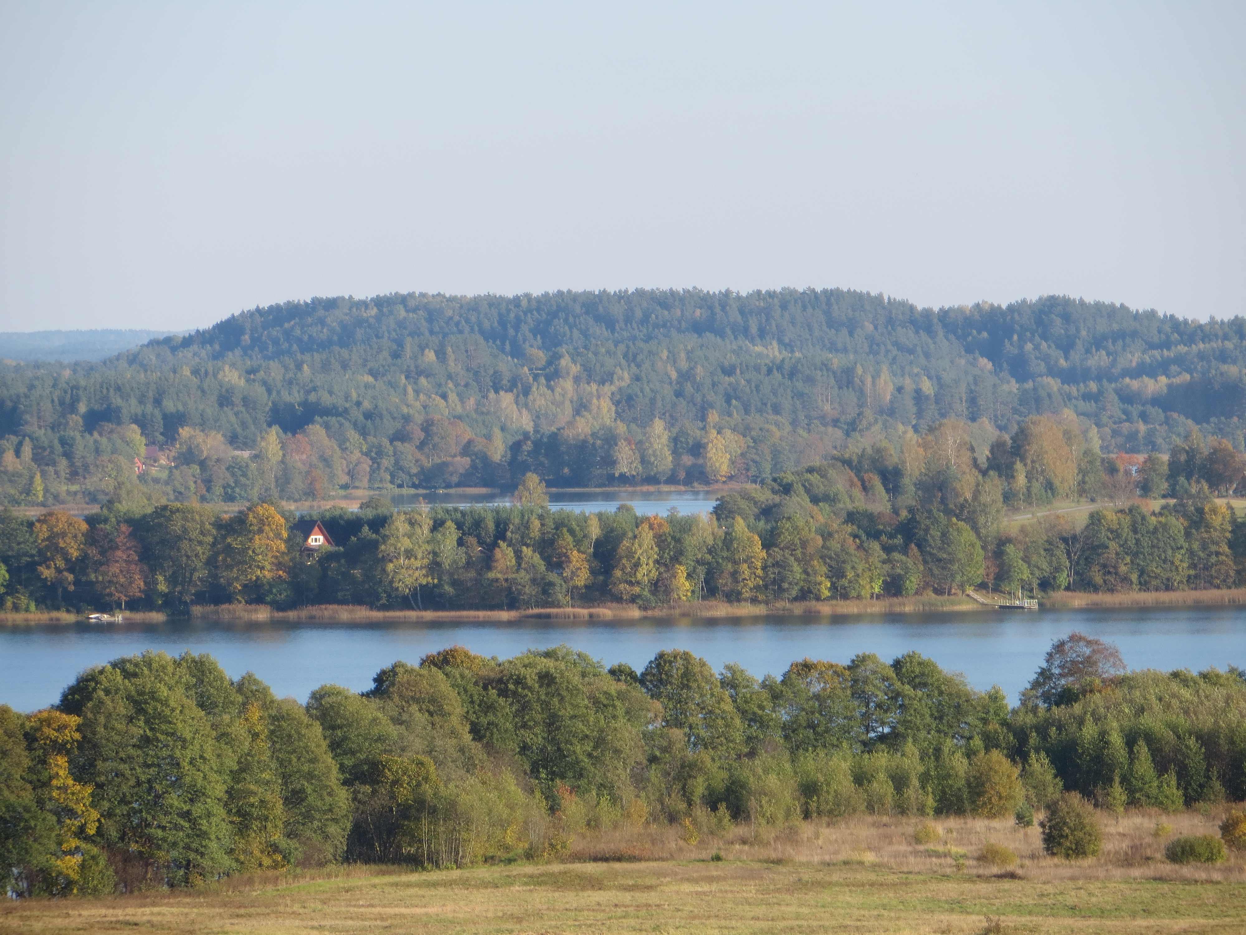 Kirdeikiai, Lithuania